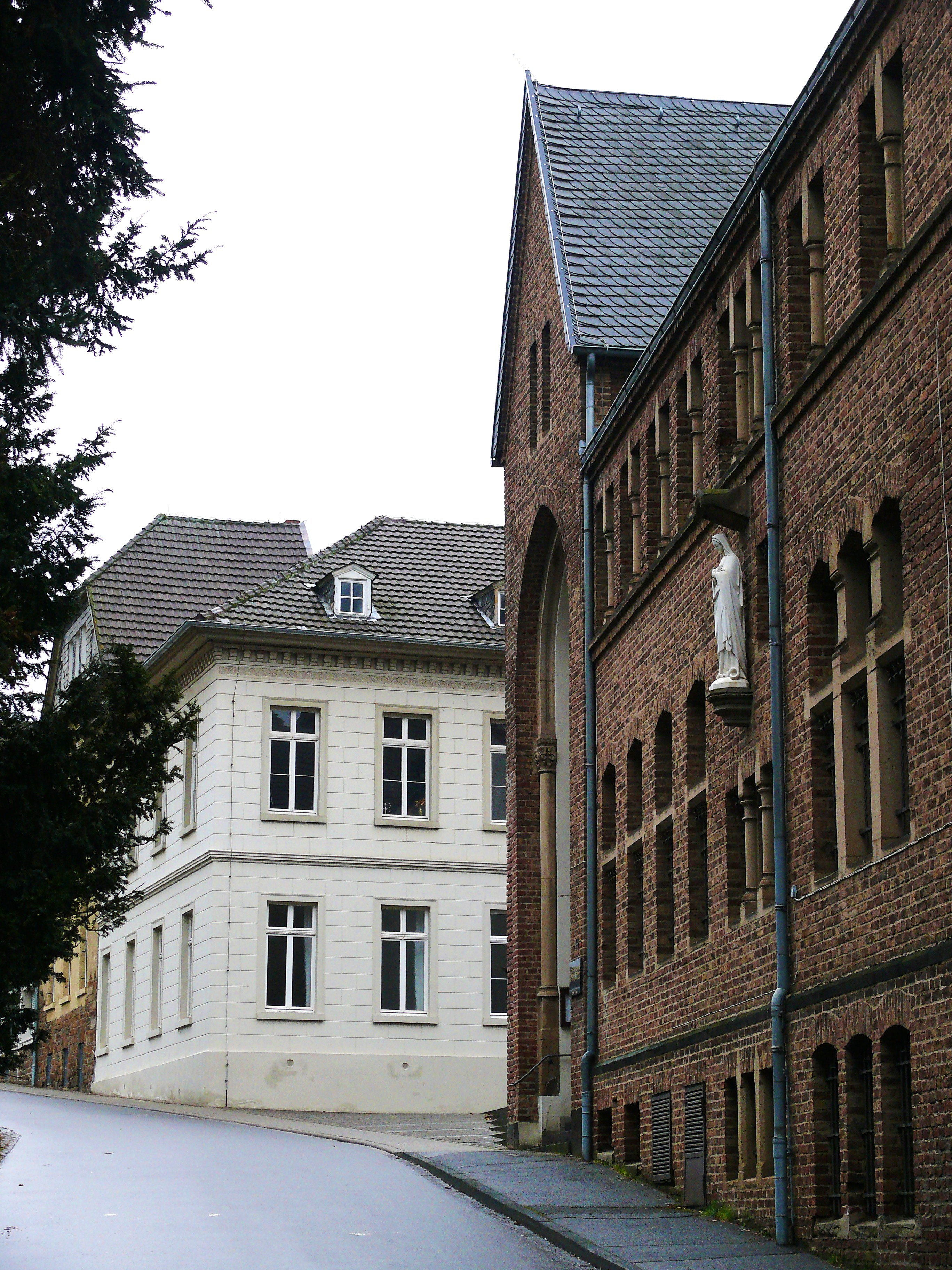 Die Marterkapelle in Bonn-Endenich; im Hintergrund ehemaliges Klostergebäude